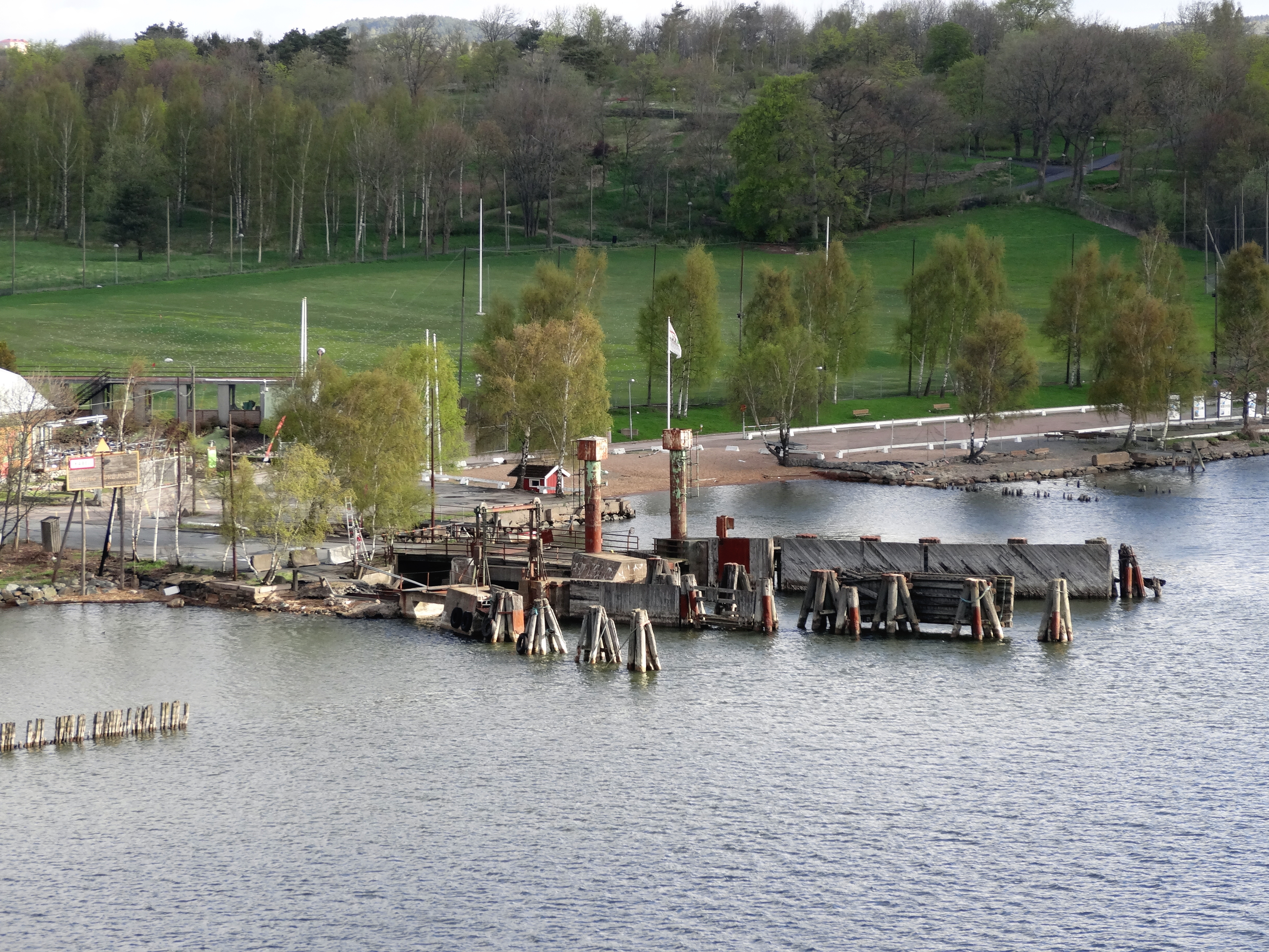 Gamla färjeläget i Färjestaden / Färjenäs på Hisingen i Göteborg.